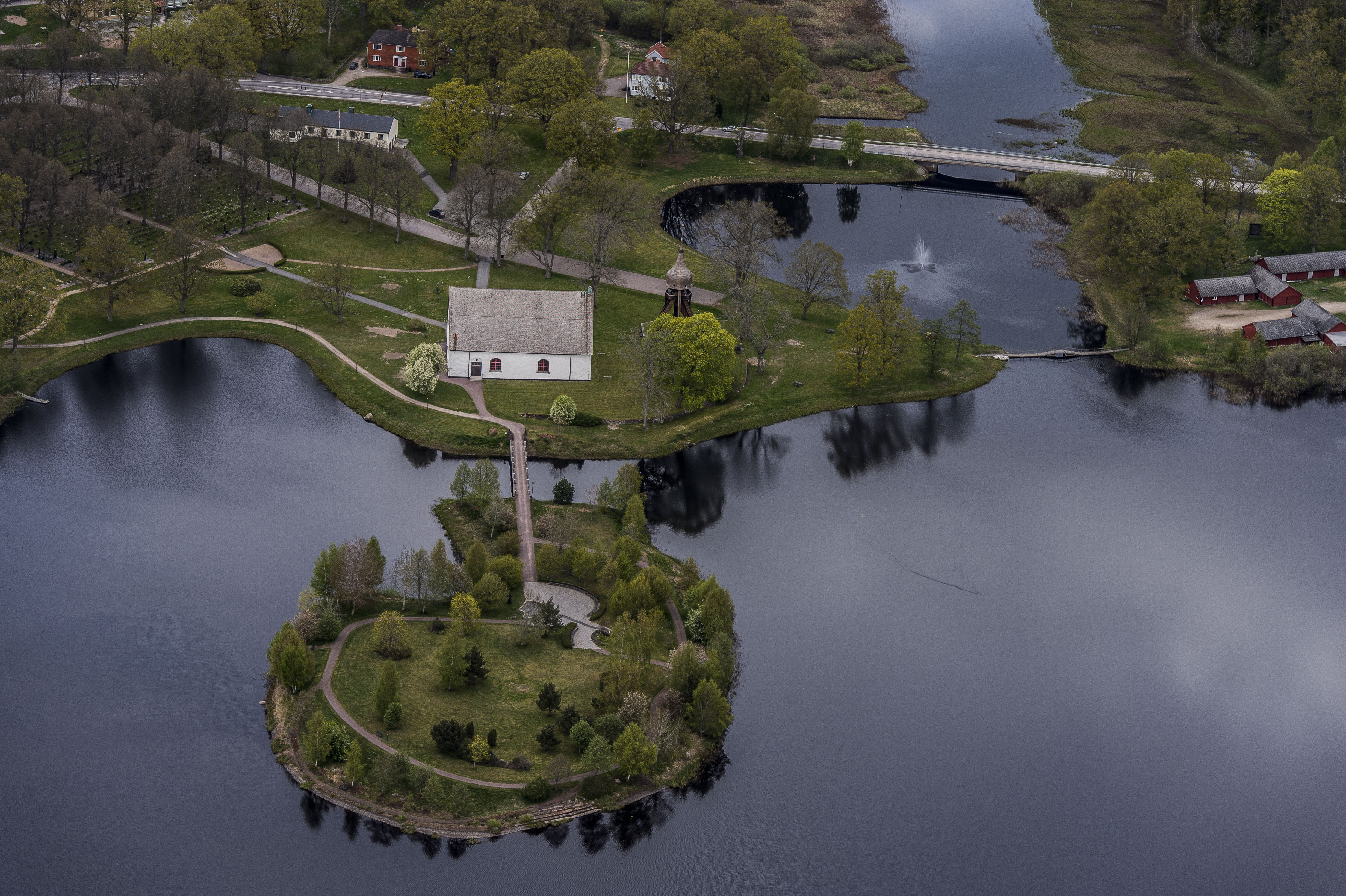 Vissefjärda ka